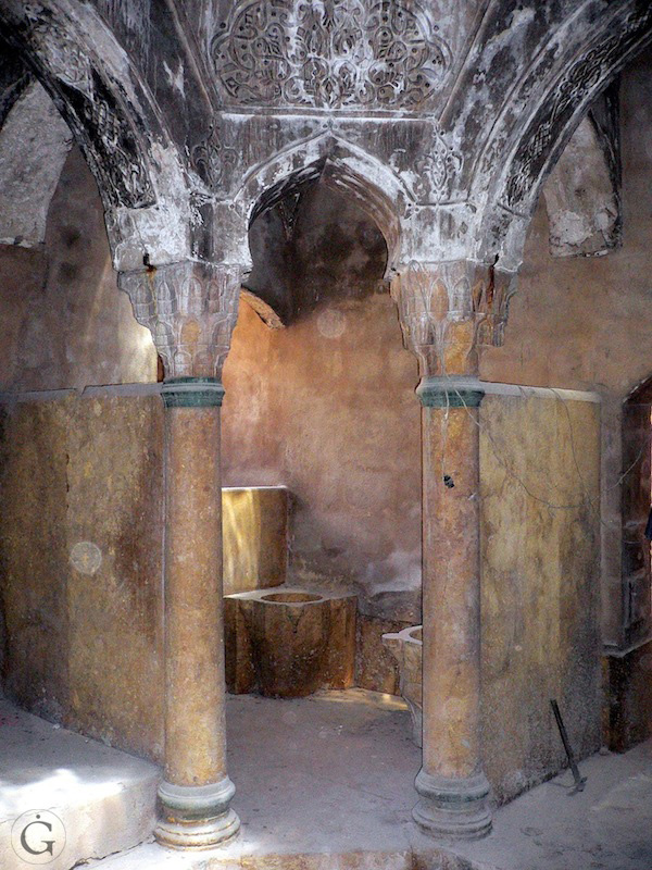 Hammam de la maison Ghazaleh à Alep avant sa restauration